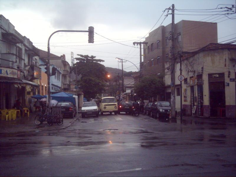 Neighborhood Fazenda da Bica, in Rio de Janeiro